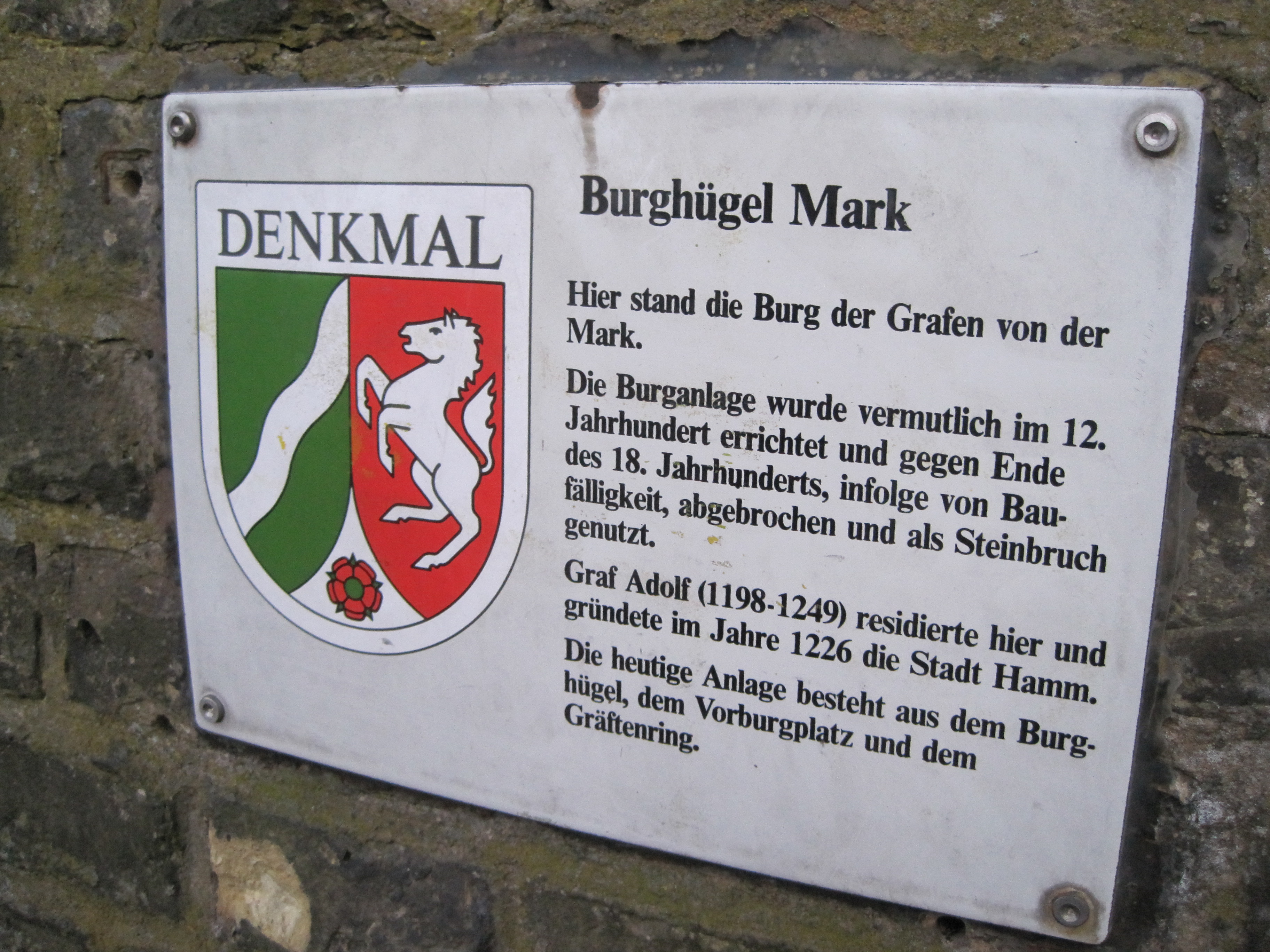 Dieses Foto zeigt eine Informationstafel auf dem Burghügel zur Mark in Hamm.